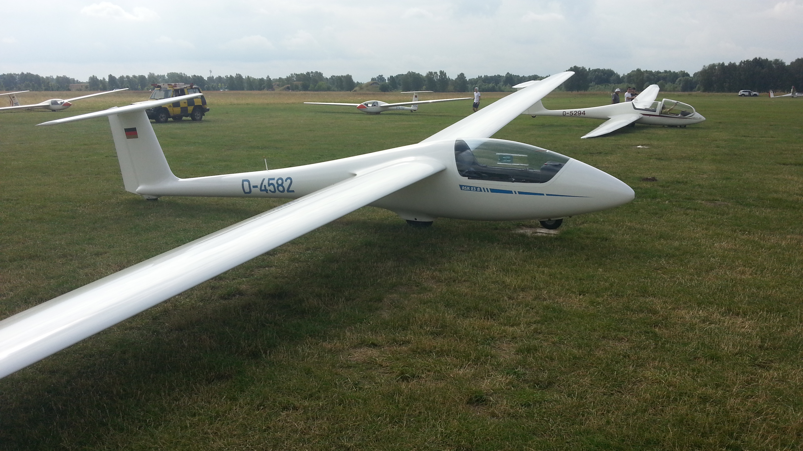 Eine ASK 23 B "D-4582". Dieses Bild entstand am Segelfluggelände in Neuruppin. Das Flugzeug ist ein Vereinsflugzeug der Luftsportfreunde Kamen/Dortmund 2000